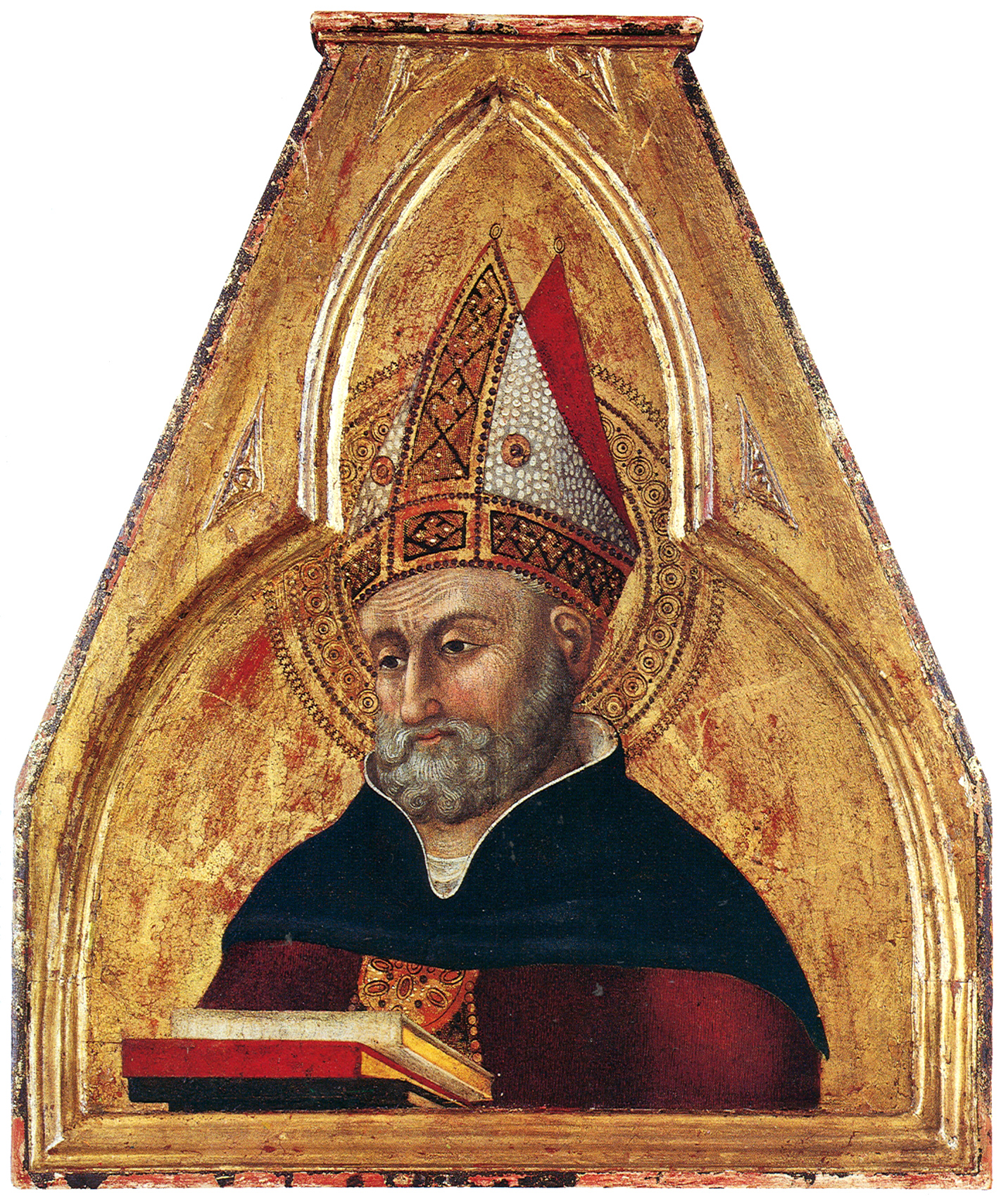 Saint Augustine